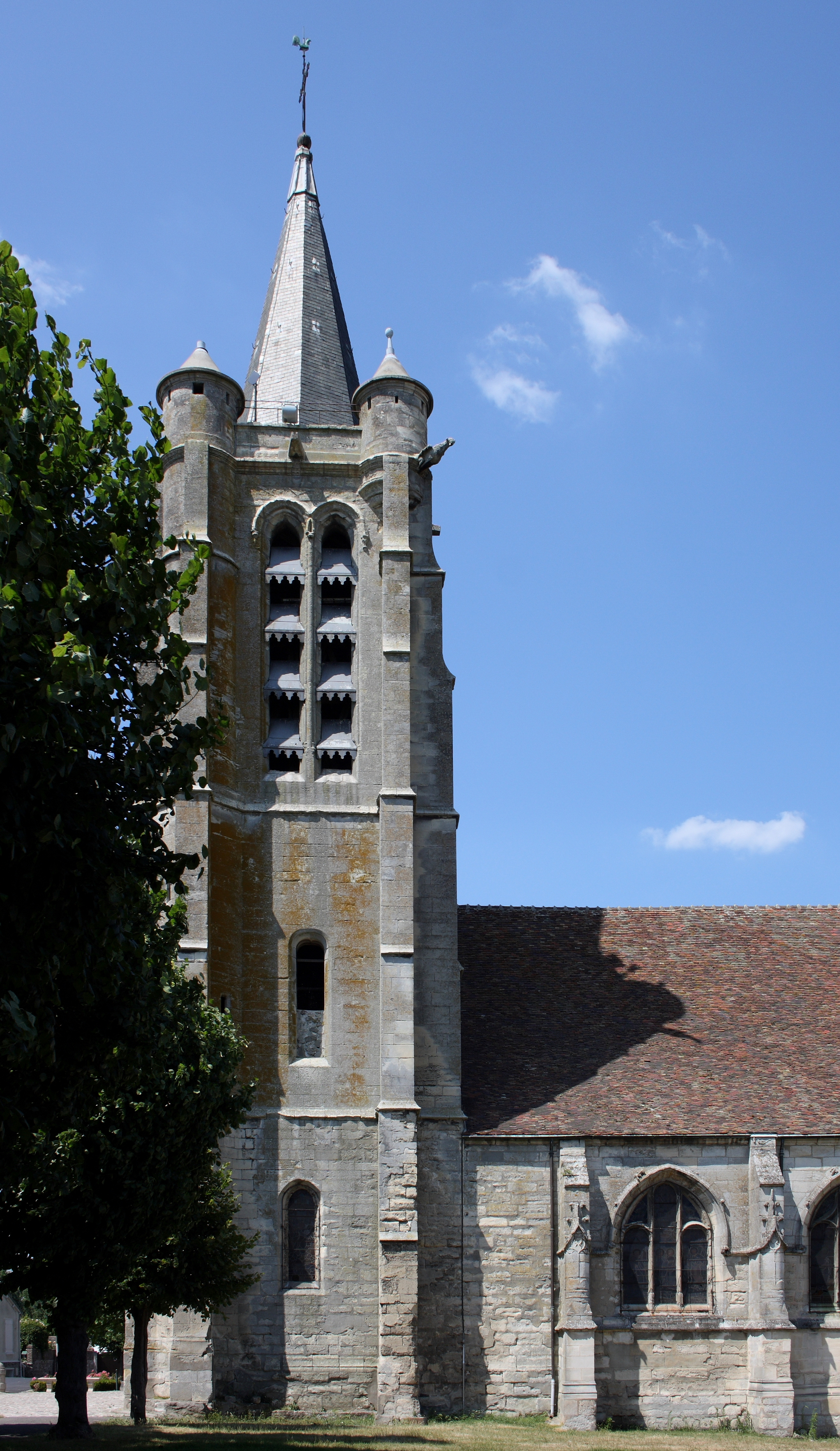 Katholische Kirche Saint-Martin in Survilliers, einer Gemeinde im Canton de Luzarches (Île de France), Ansicht von Süden